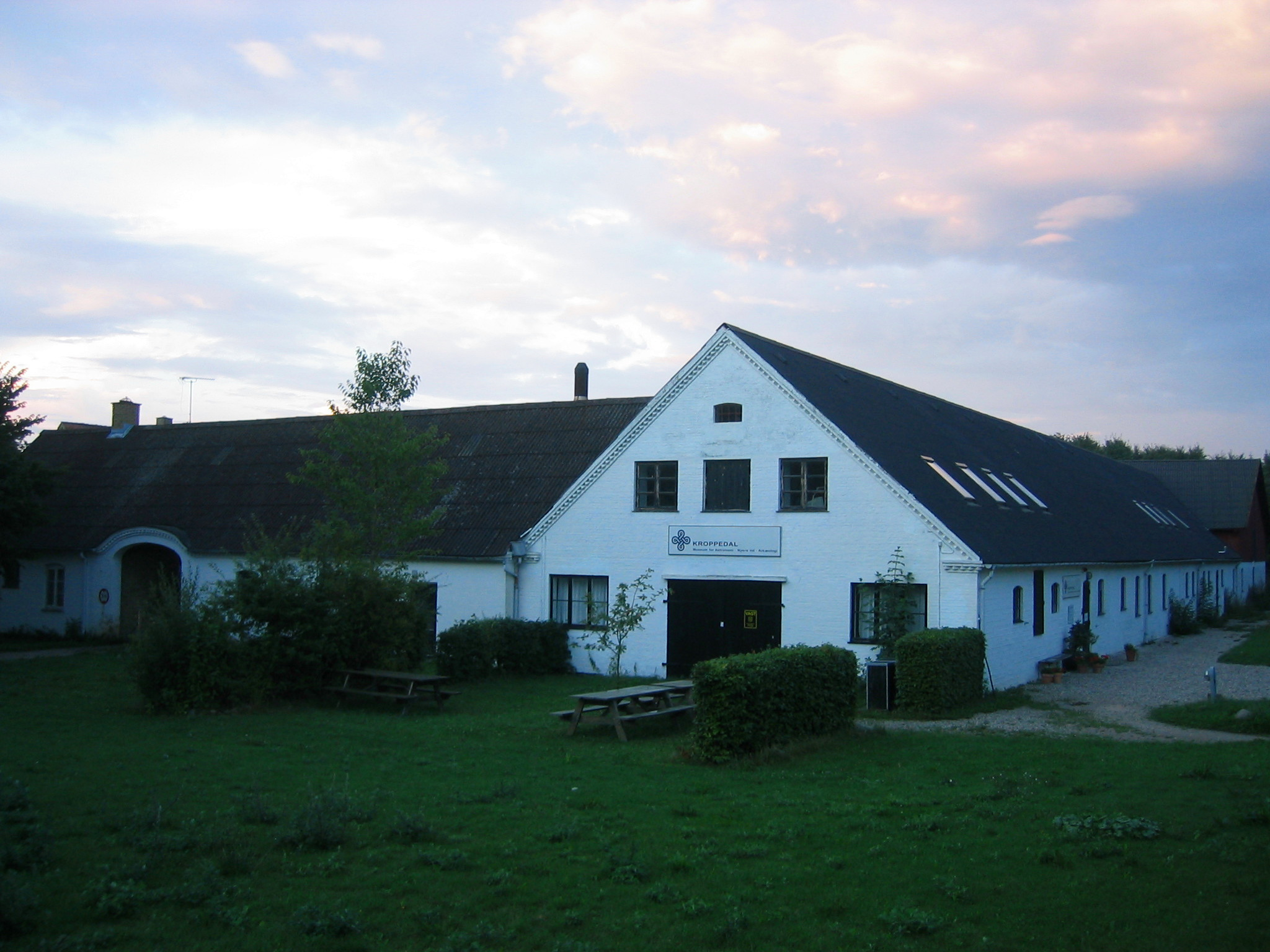 Kroppedal Museum in Vridsløsemagle, Denmark